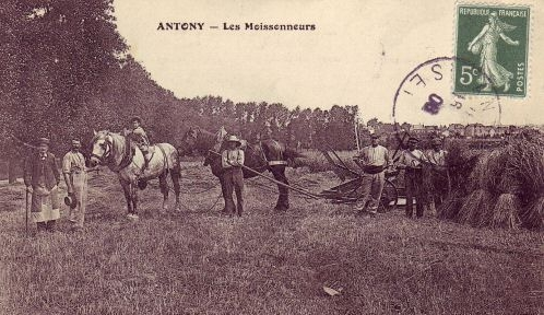 Antony : carte postale "Les moissonneurs en 1908"